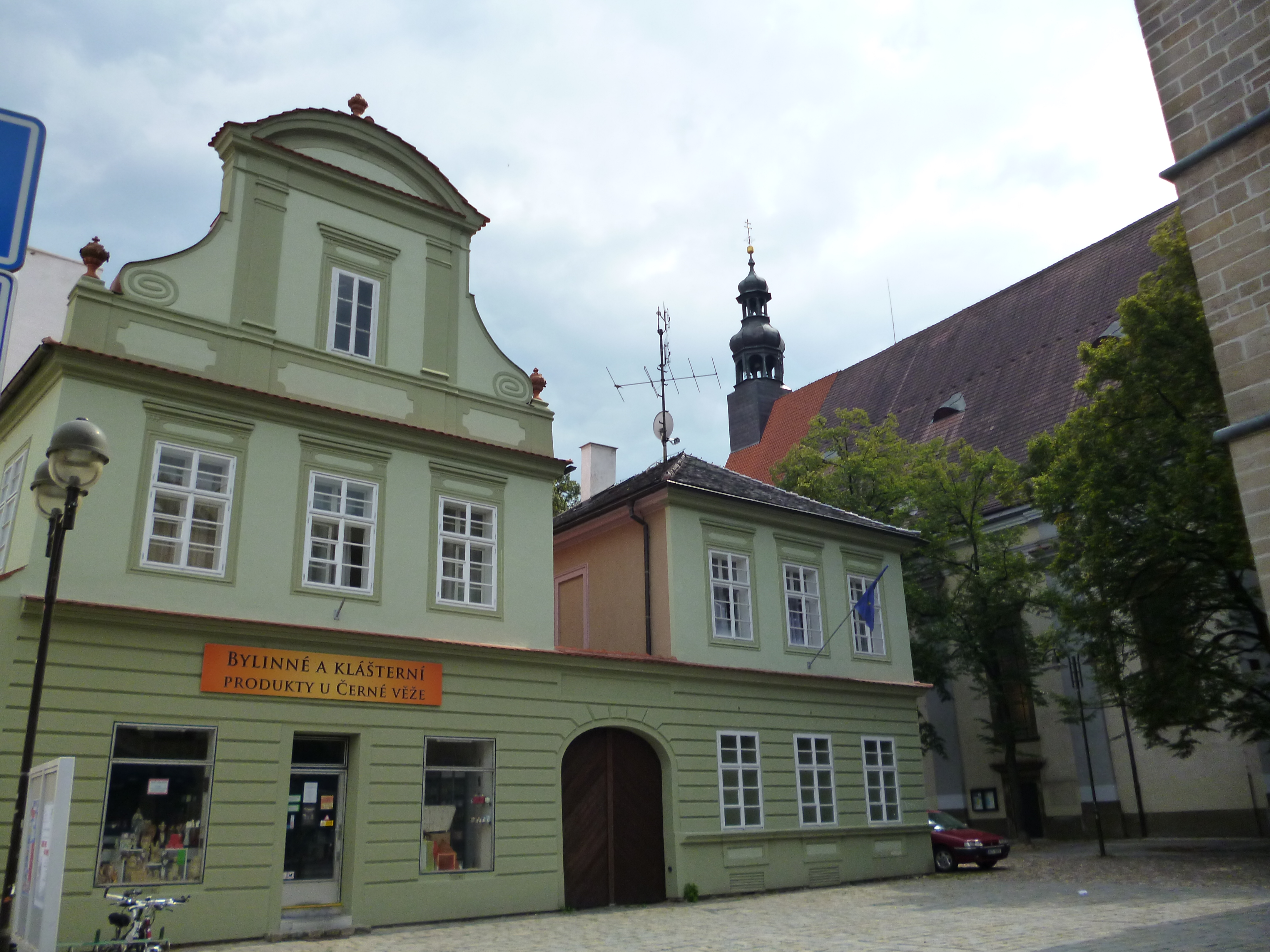 děkanství, U Černé věže 71/4